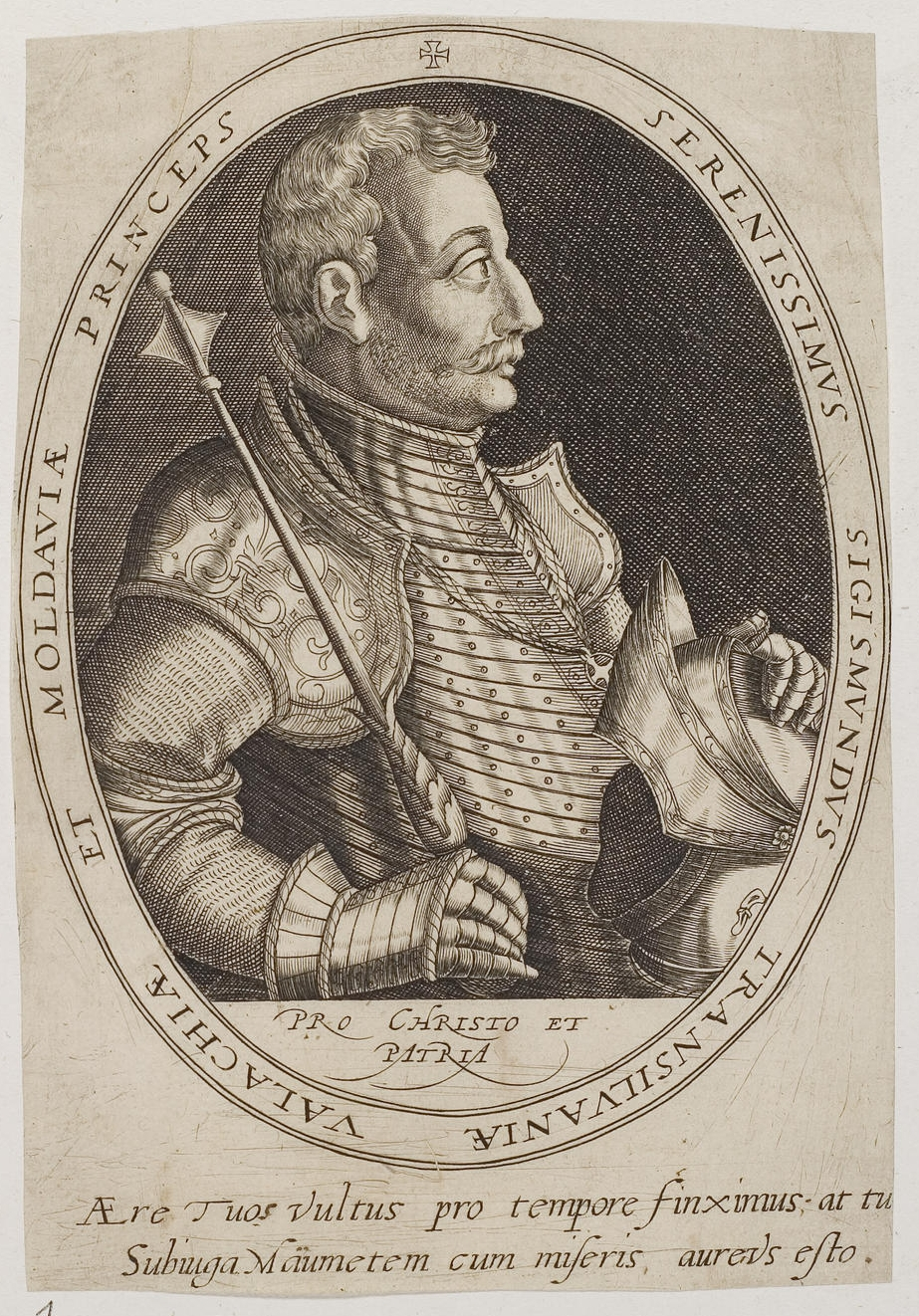 Grafik aus dem Klebeband Nr. 2 der Fürstlich Waldeckschen Hofbibliothek Arolsen Motiv: Sigismund Báthory